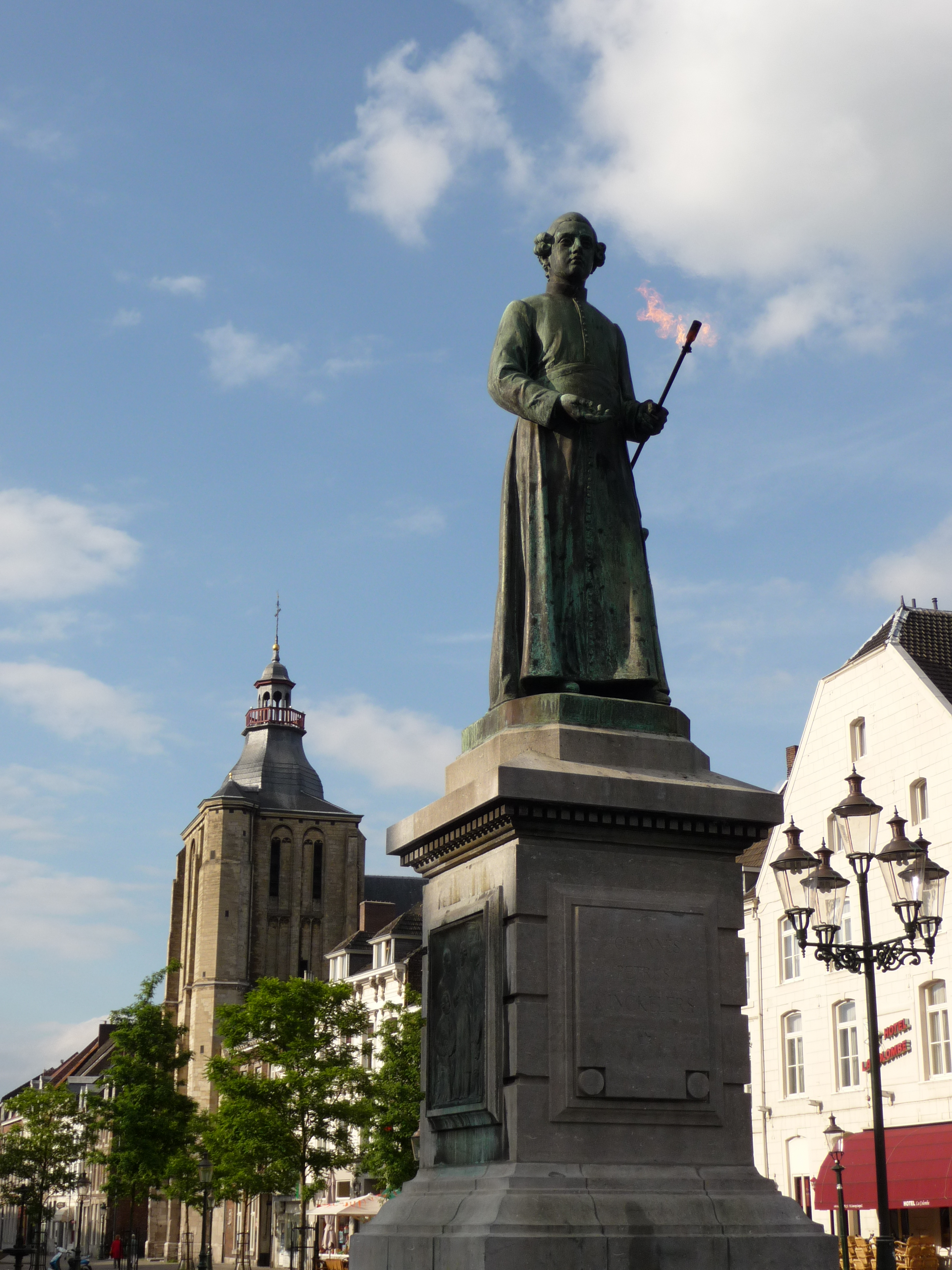 Standbeeld Minckeleers in de Boschstraat, Maastricht